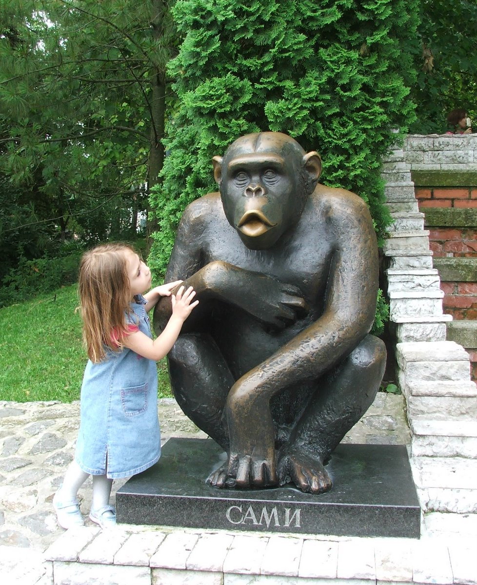 Игор Ирић, -{ }-, -{ -{FujiFilm S5500}- Licensing